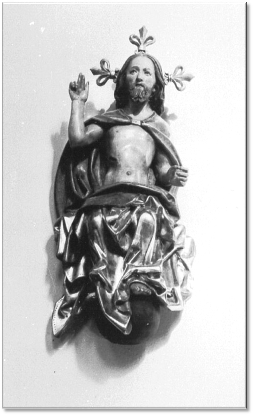 Stadtpfarrkirche St. Nikolaus in Veringenstadt. Auferstehungschristus Höhe 108 cm. Holz, um 1490, neu bemalt, unter Syrlin´schem Einfluss.